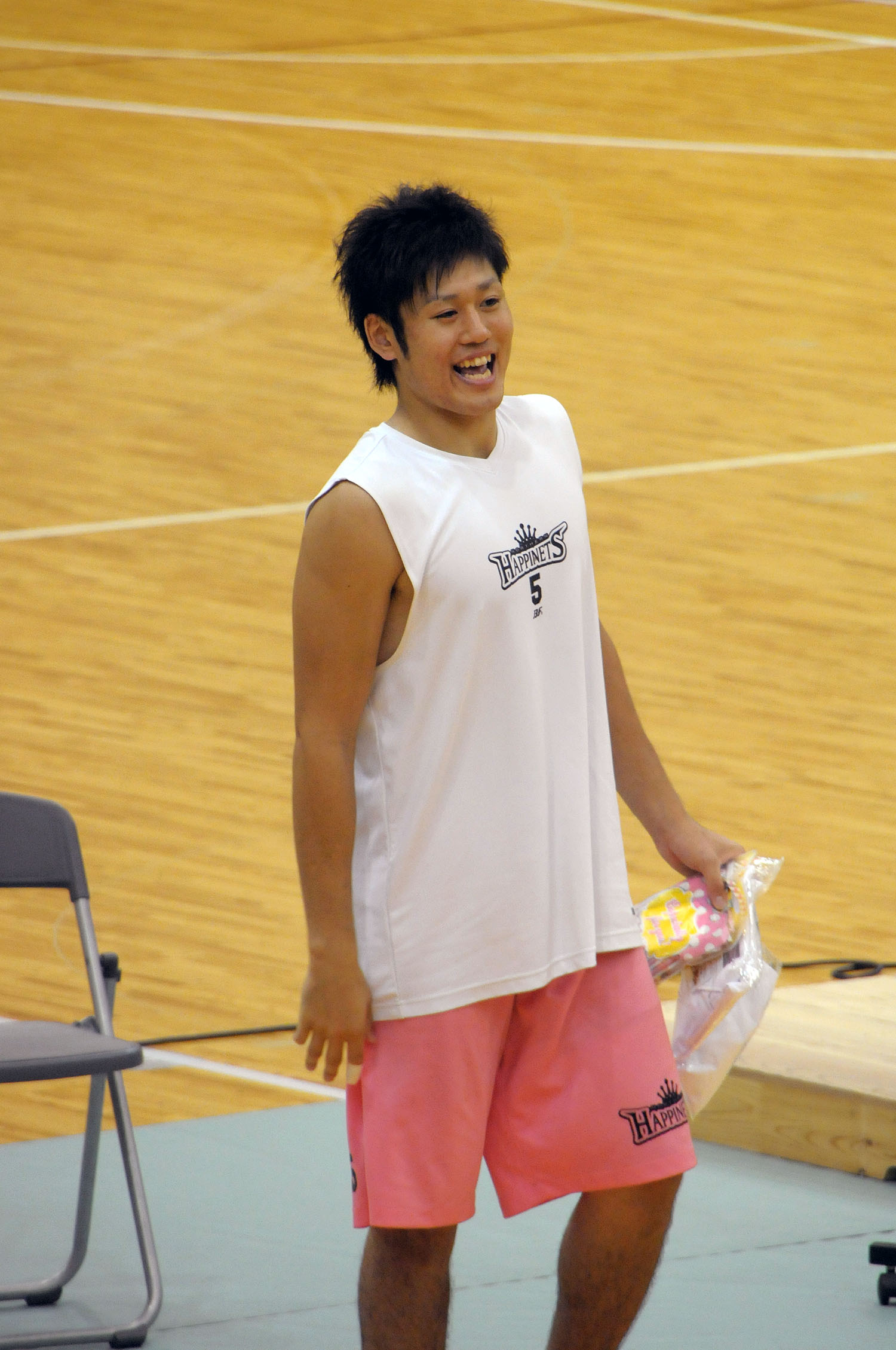 秋田ノーザンハピネッツ、田口成浩選手。琴丘総合体育館で。